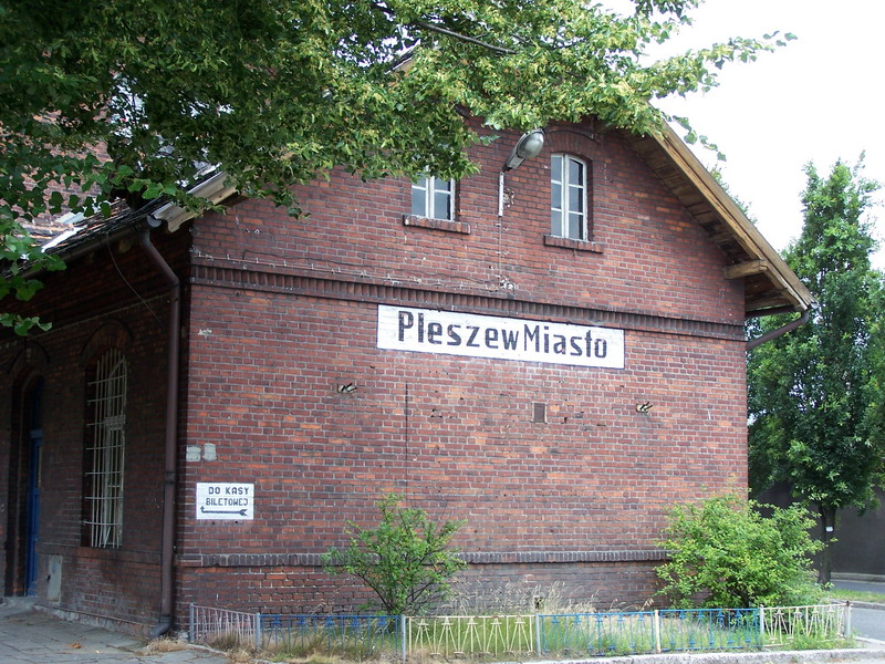 Stacja kolejki wąskotorowej PLESZEW MIASTO.